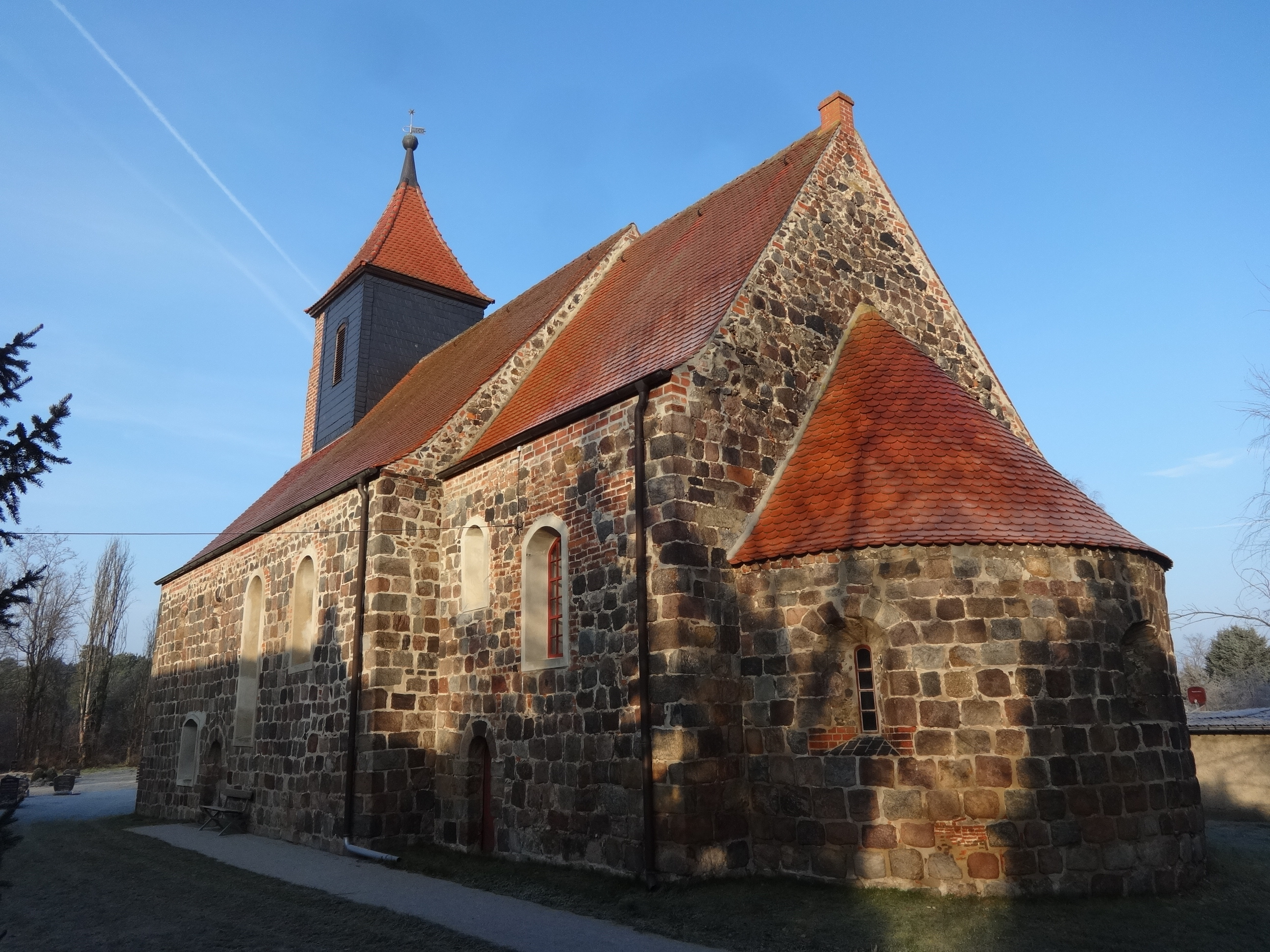 Die Feldsteinkirche in Neuheim in Jüterbog entstand vermutlich in der ersten Hälfte des 13. Jahrhunderts. Sie wird im 21. Jahrhundert als Feierhalle genutzt. Im Innern befinden sich Grabplatten der Pastoren Wolfgang Schmidt (gestorben 1663) und von Johann Friedrich Ulrich mit Ehefrau (gestorben 1737).